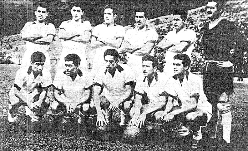 Formación del club chileno de fútbol Deportes Temuco, campeón del Campeonato Regional de 1961.